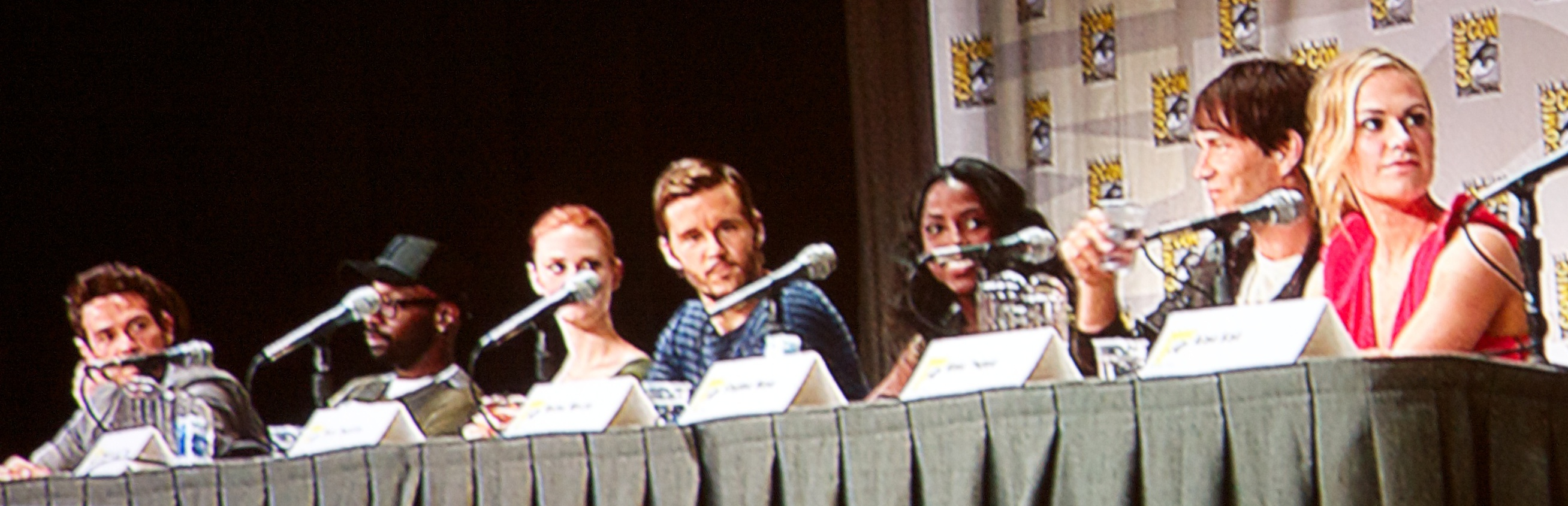 True Blood panel at 2011 International Comic-Con San Diego